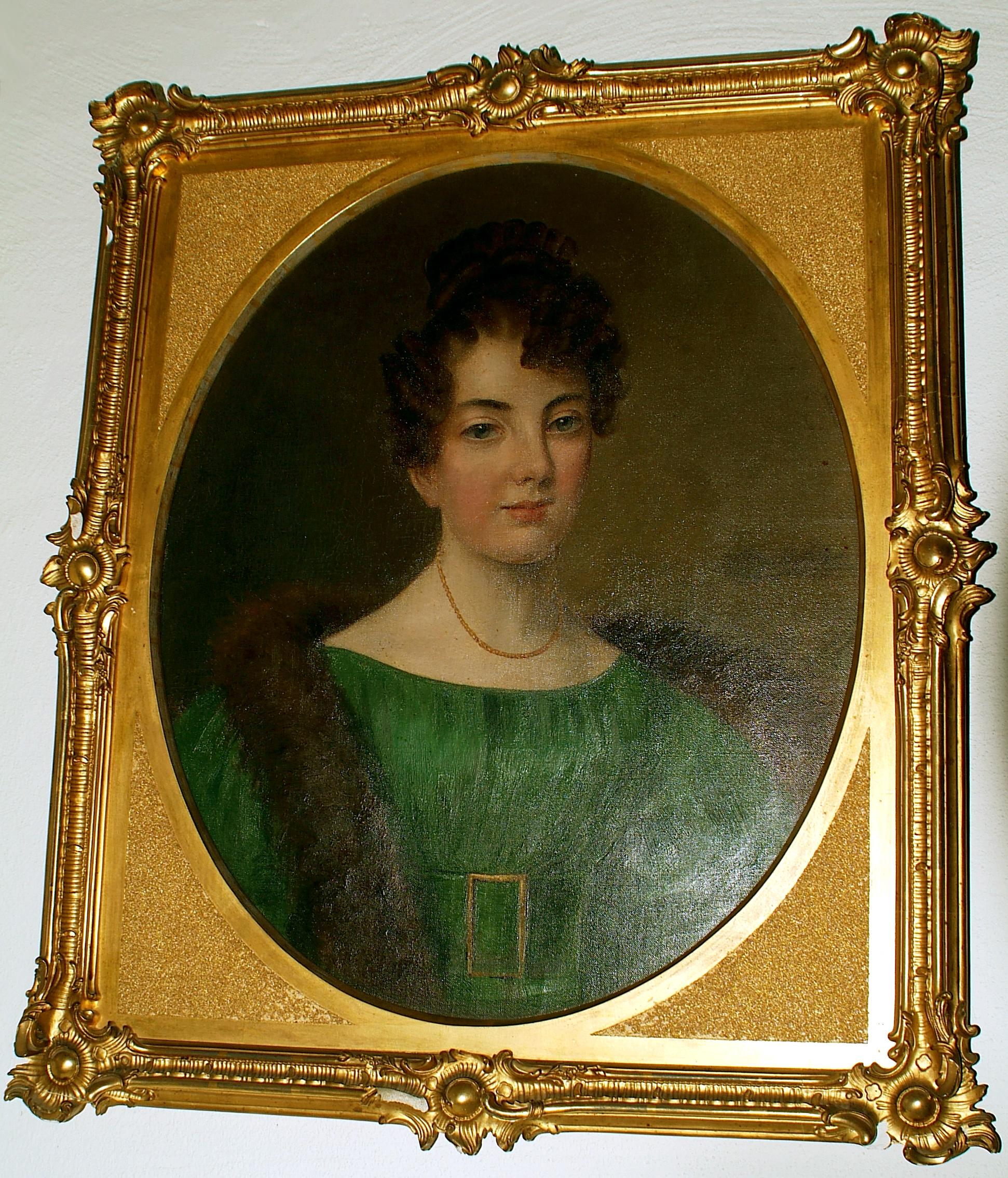 Charlotte von Graevemeyer wurde am 19. Juli 1817 in London als Charlotte Weston-Jacob geboren. Sie heiratete Eberhard Friedrich von Graevemeyer, mit dem sie vier Kinder hatte. Das Foto wurde aufgrund der Blitzlicht-Reflexion von schräg rechts aufgenommen und sollte frontal ohne Blitz und mit Langzeitbelichtung noch einmal neu aufgenommen werden ...